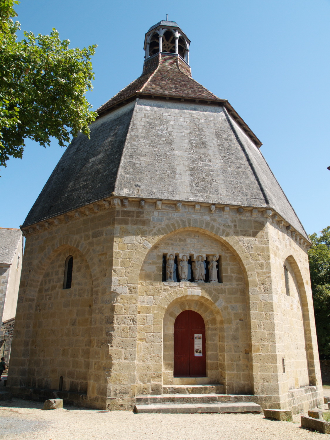 L'Octogone de Montmorillon (s. XII). Capella romànica del cementiri que hi havia al recinte de la Maison-Dieu.